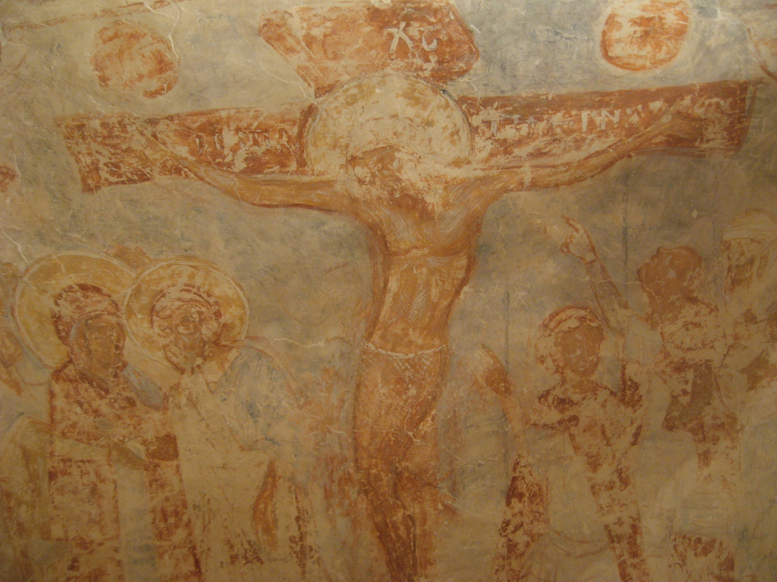 Фреска собора Снетогорского монастыря. 1313 год.